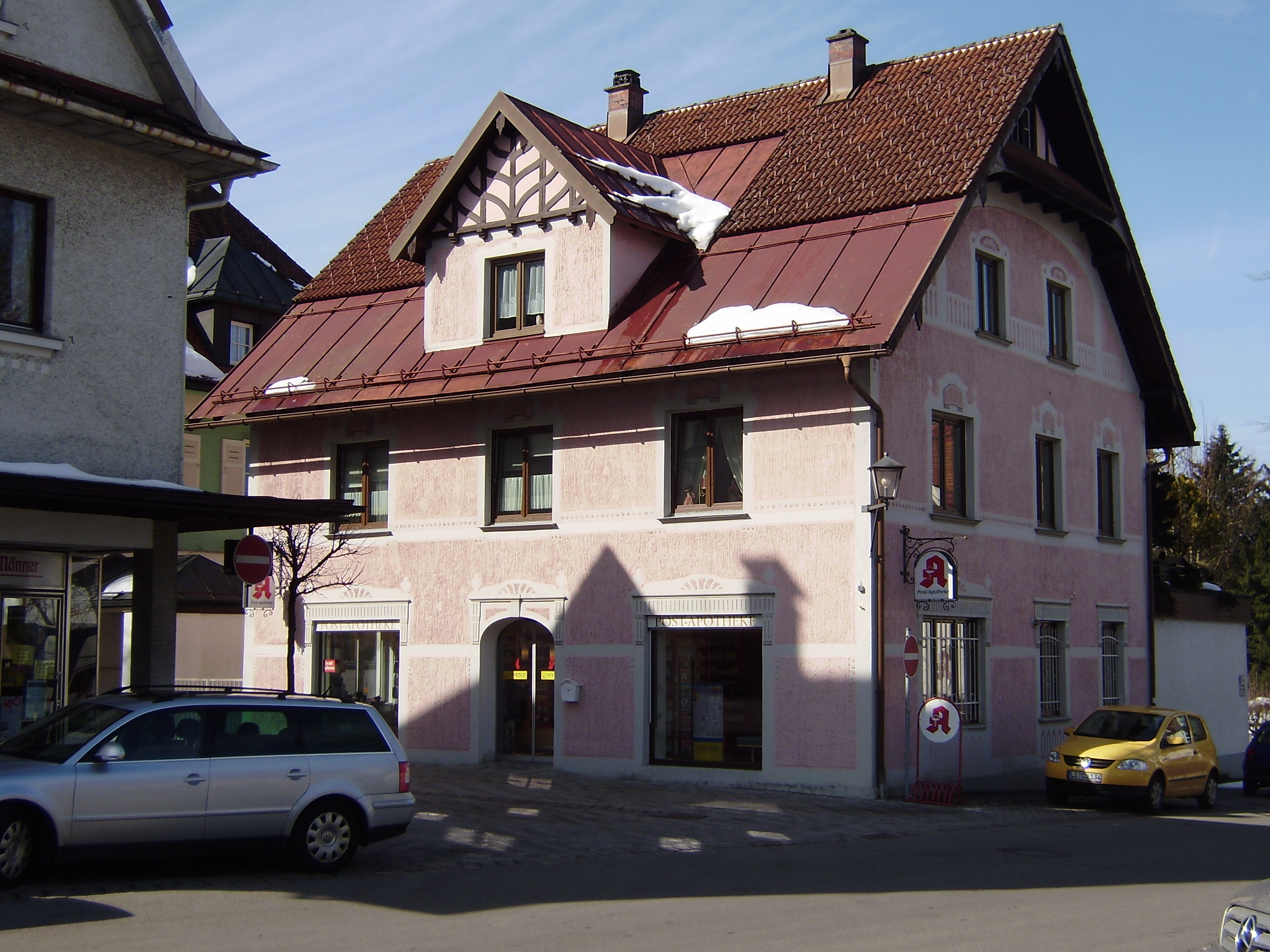 Geschäftshaus Baldauf, Bahnhofstr 9, Weiler iA. Errichtet 2010 von Architekt und Baumeister Georg Bufler.